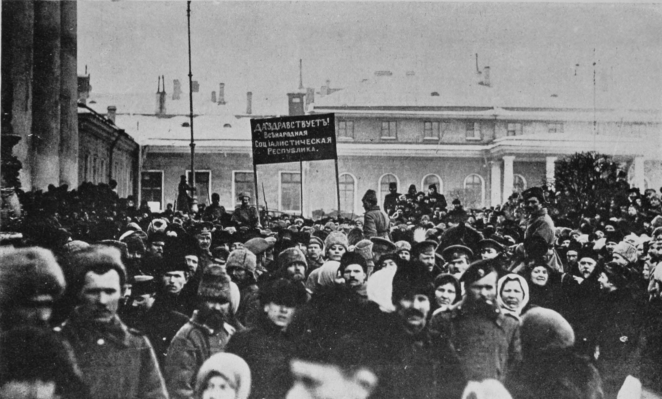 Manifestación a favor de la república en Petrogrado, marzo de 1917.